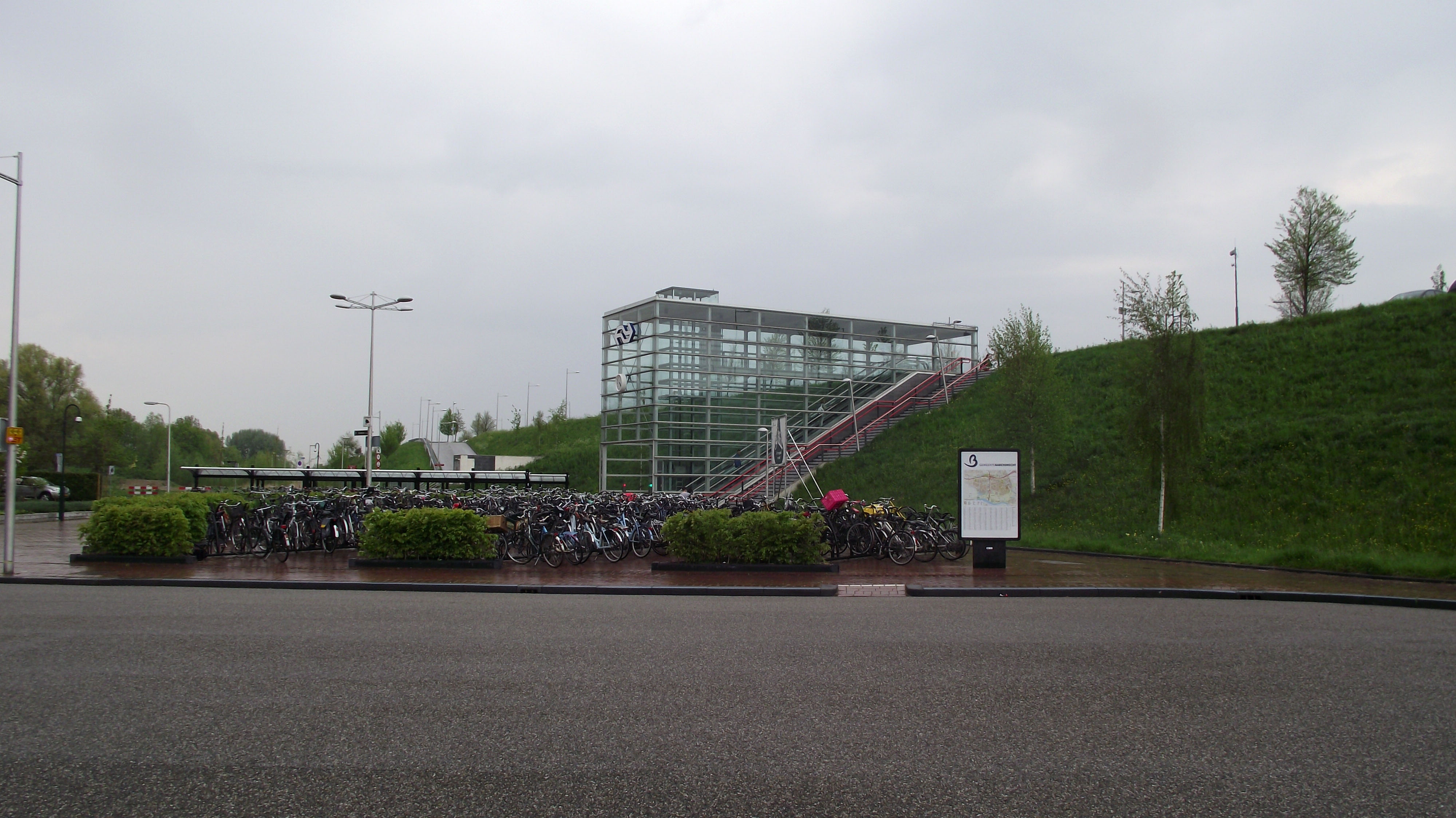 Ingang station Barendrecht gezien vanaf het busstation aan de westkant.